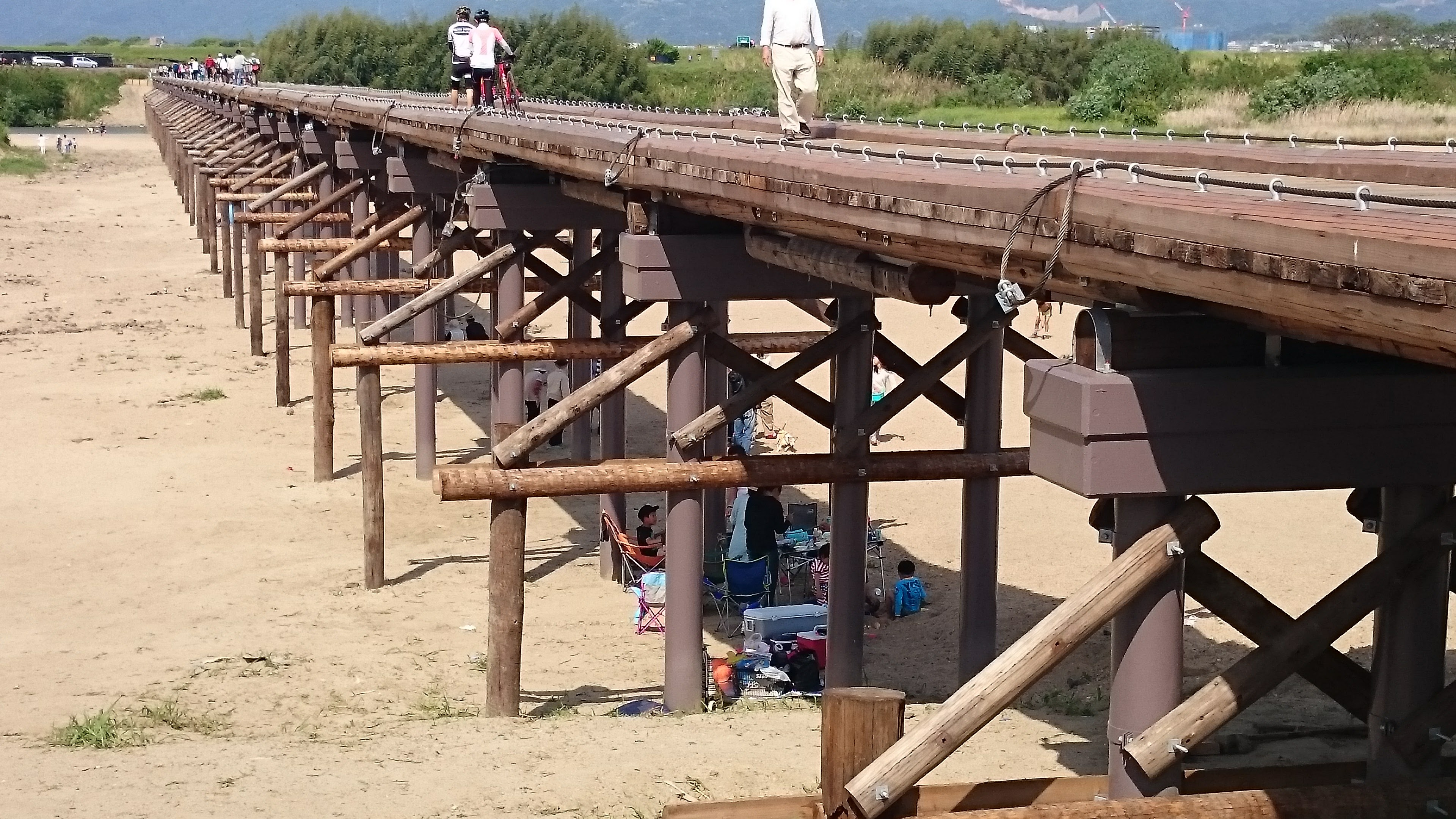 橋桁は、直径30～40㎝の北山杉156本利用されている